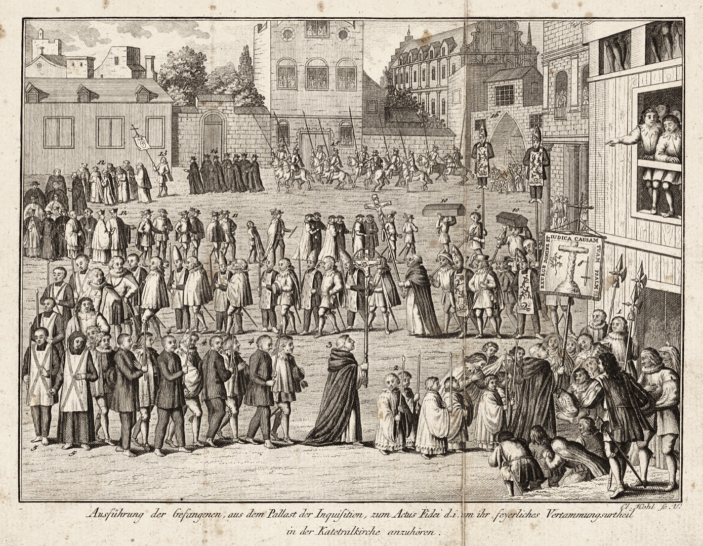 Ausführung der Gefangenen, aus dem Pallast der Inquisition, zum Actus Fidei, d.i. um ihr feierliches Vertammungsurtheil in der Katedralkirche anzuhören